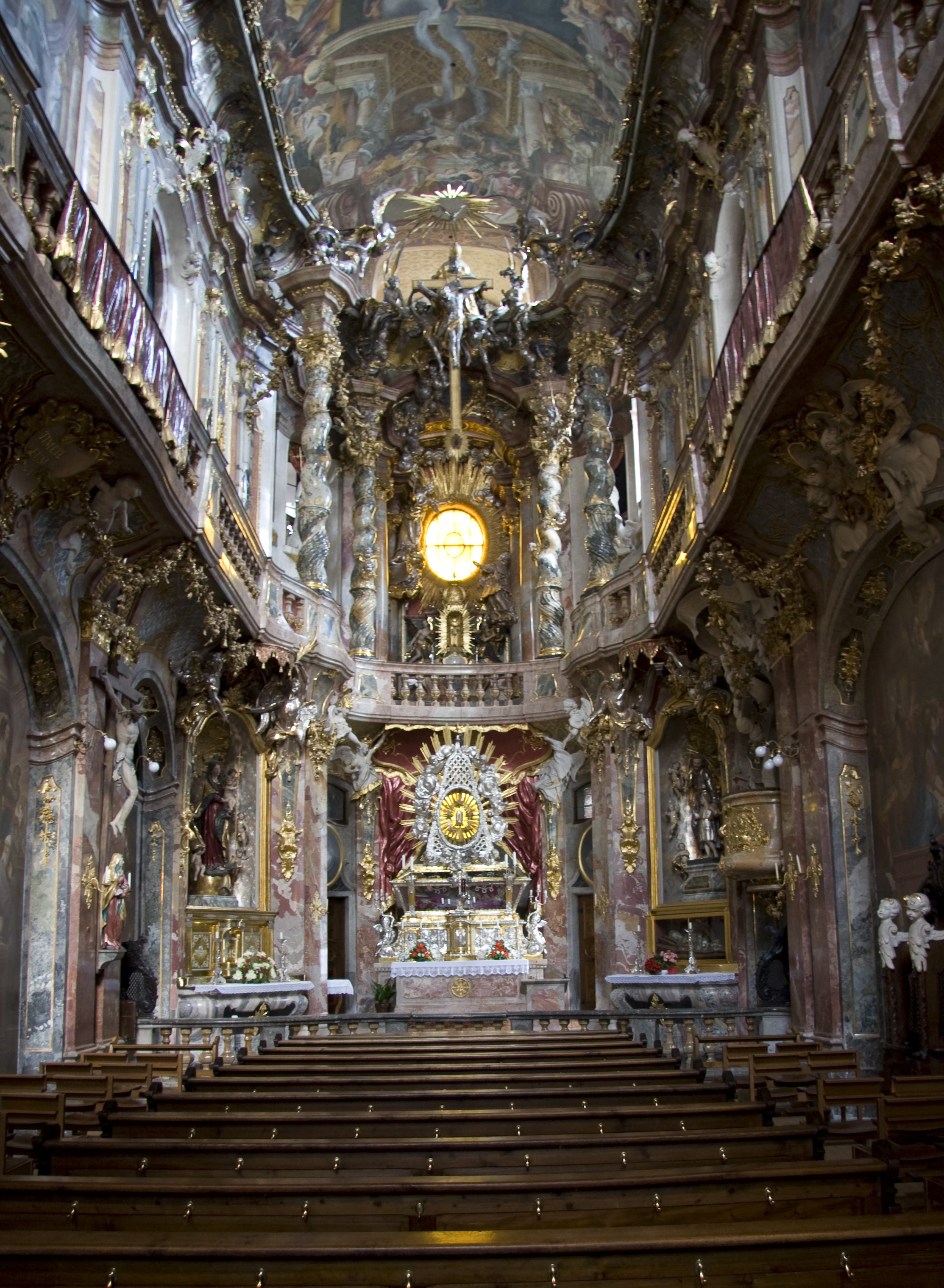 St. Johann Nepomuk (Asamkirche) München inside